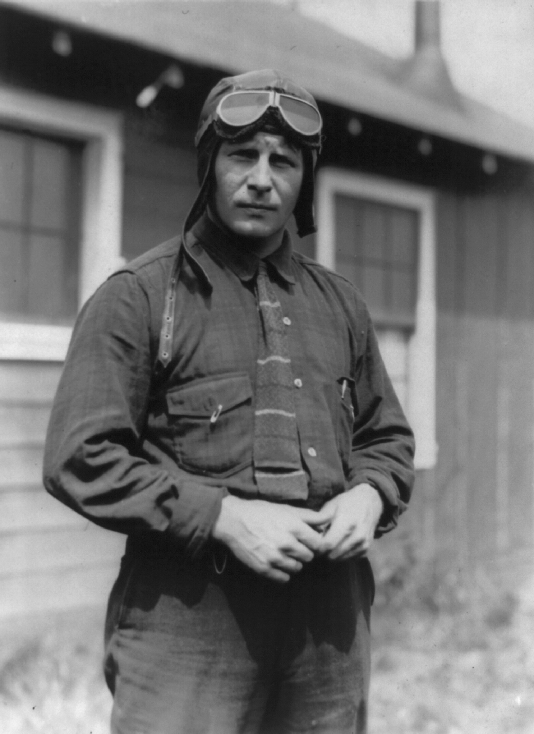 Bernt Balchen (* 23. Oktober 1899 in Tveit, Kristiansand, Norwegen; † 17. Oktober 1973 in Mount Kisco, New York, Vereinigte Staaten), norwegischer Polarforscher, Luftfahrtpionier und US-Colonel